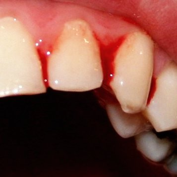 Zuby.